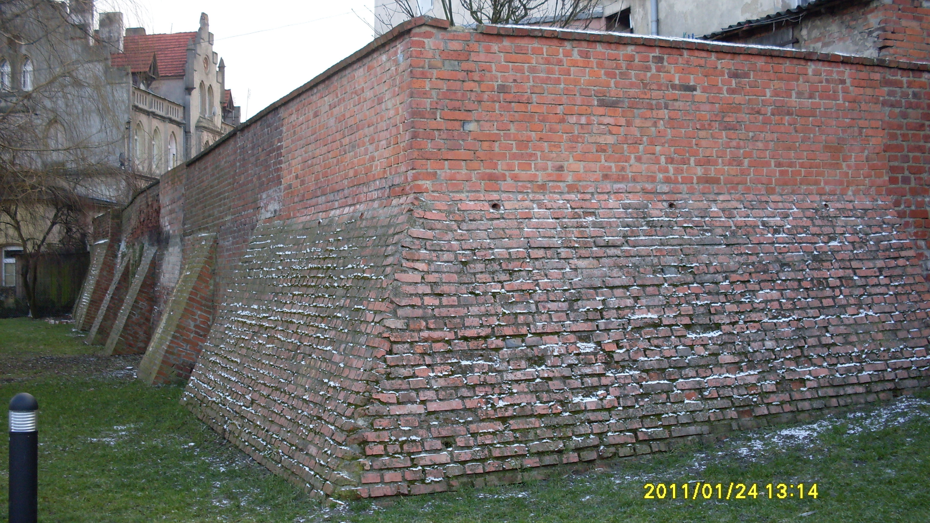 Jakub